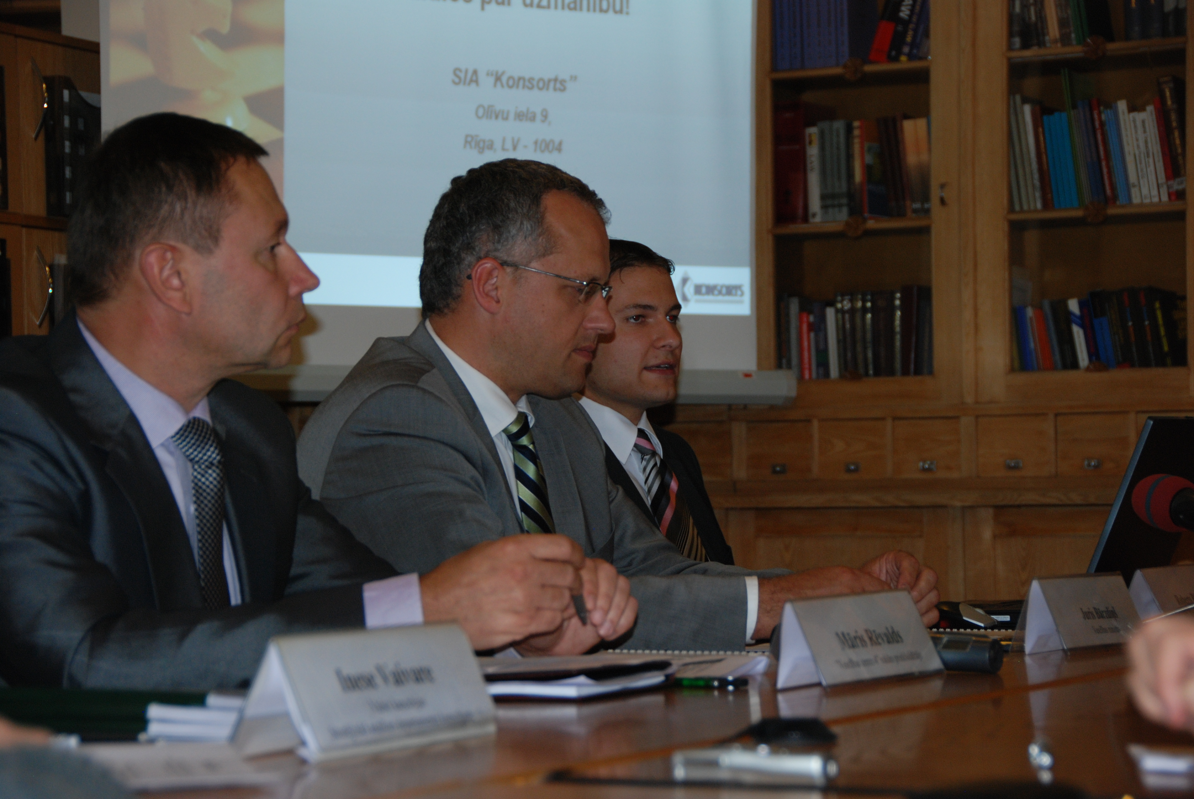 Piektdien, 17.jūnijā notika veselības ekportspējas pētījuma prezentācija medijiem, kurā piedalījās Valsts kancelejas Stratēģiskās analīzes departamenta vadītāja Eva Upīte, Veselības ministrs Juris Bārzdiņš, Veselības centrs 4 valdes priekšsēdētājs Māris Rēvalds un R.Bluķis.